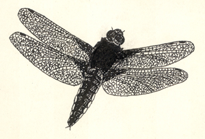 Ważka, rysunek piórkiem, autor - Jan Jerzy Karpiński.